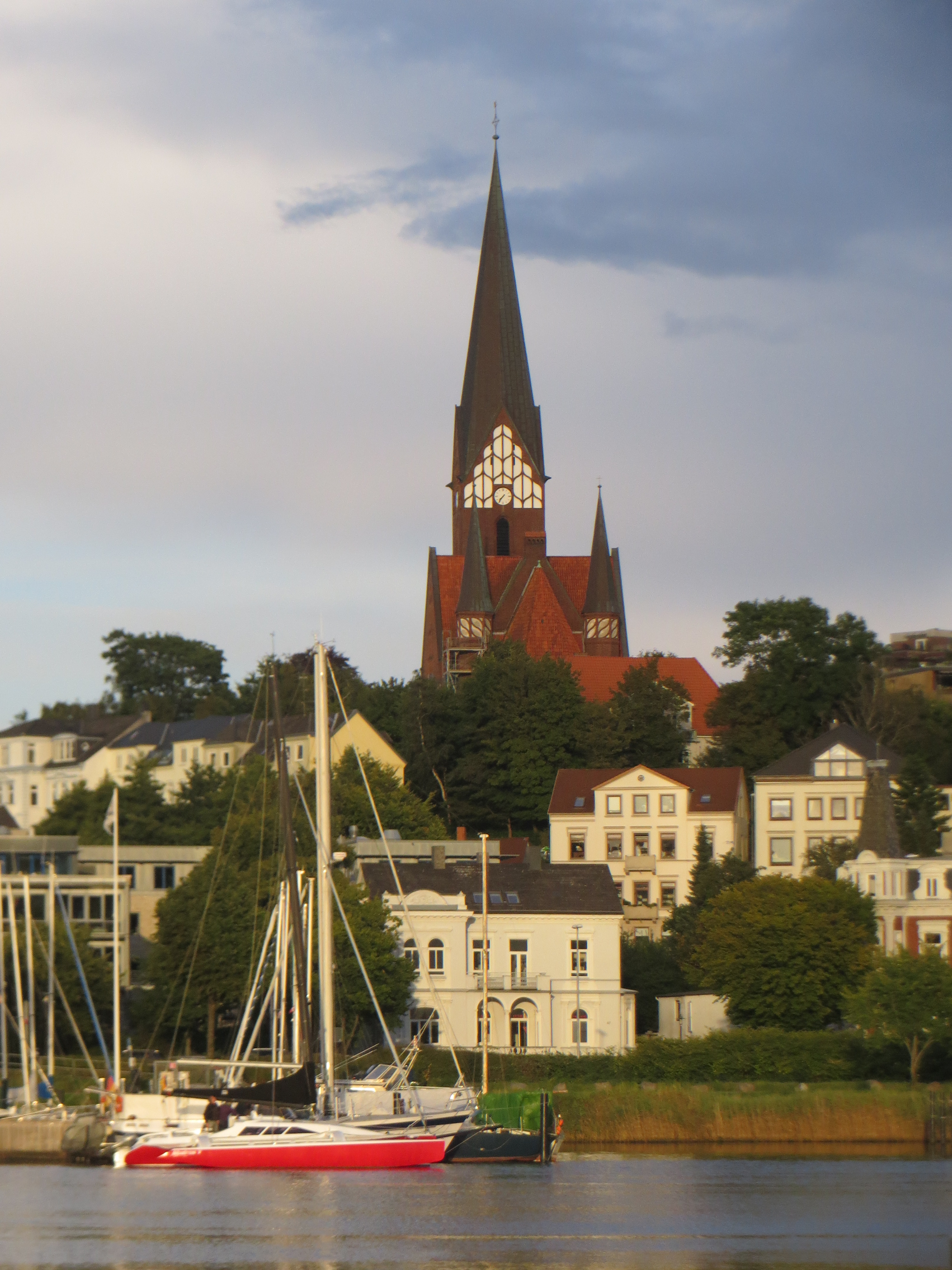 St. Jürgen-Kirche vom Hafen aus (eine etwas größere Aufnahme), Bild 02)